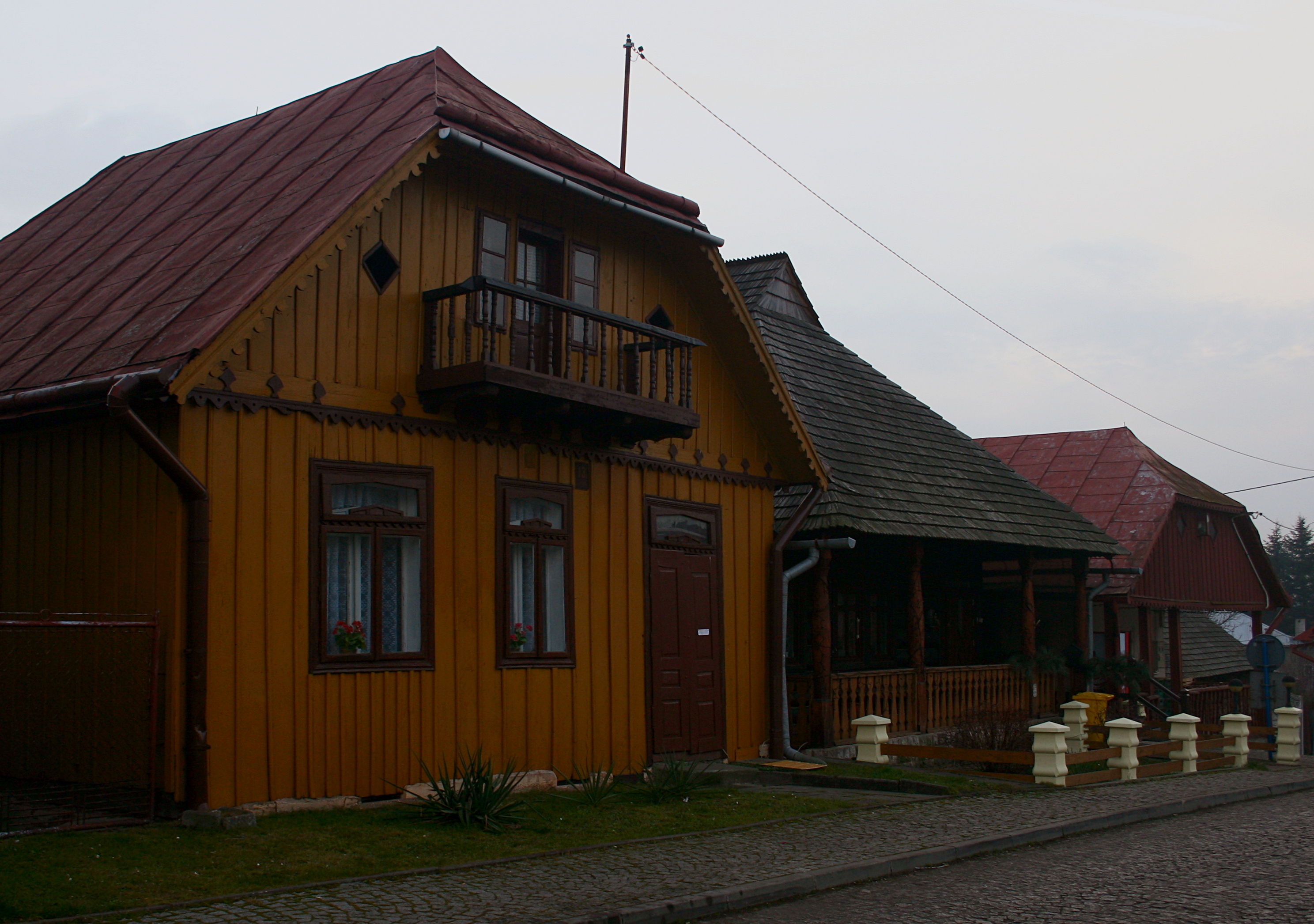 Dom w zabudowie rynku w Pruchniku